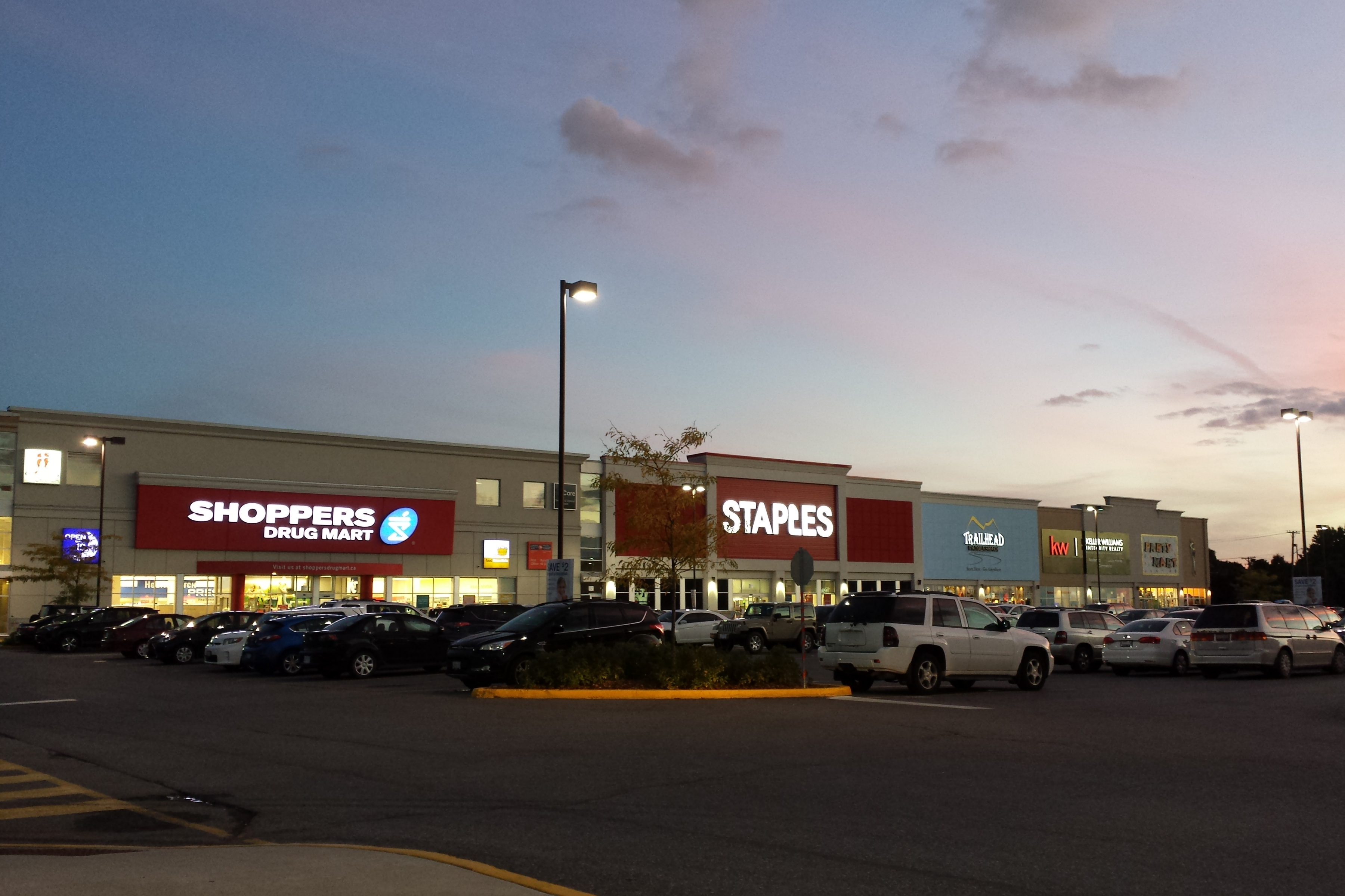 Fairlawn Plaza, Ottawa, Ontario, Canada